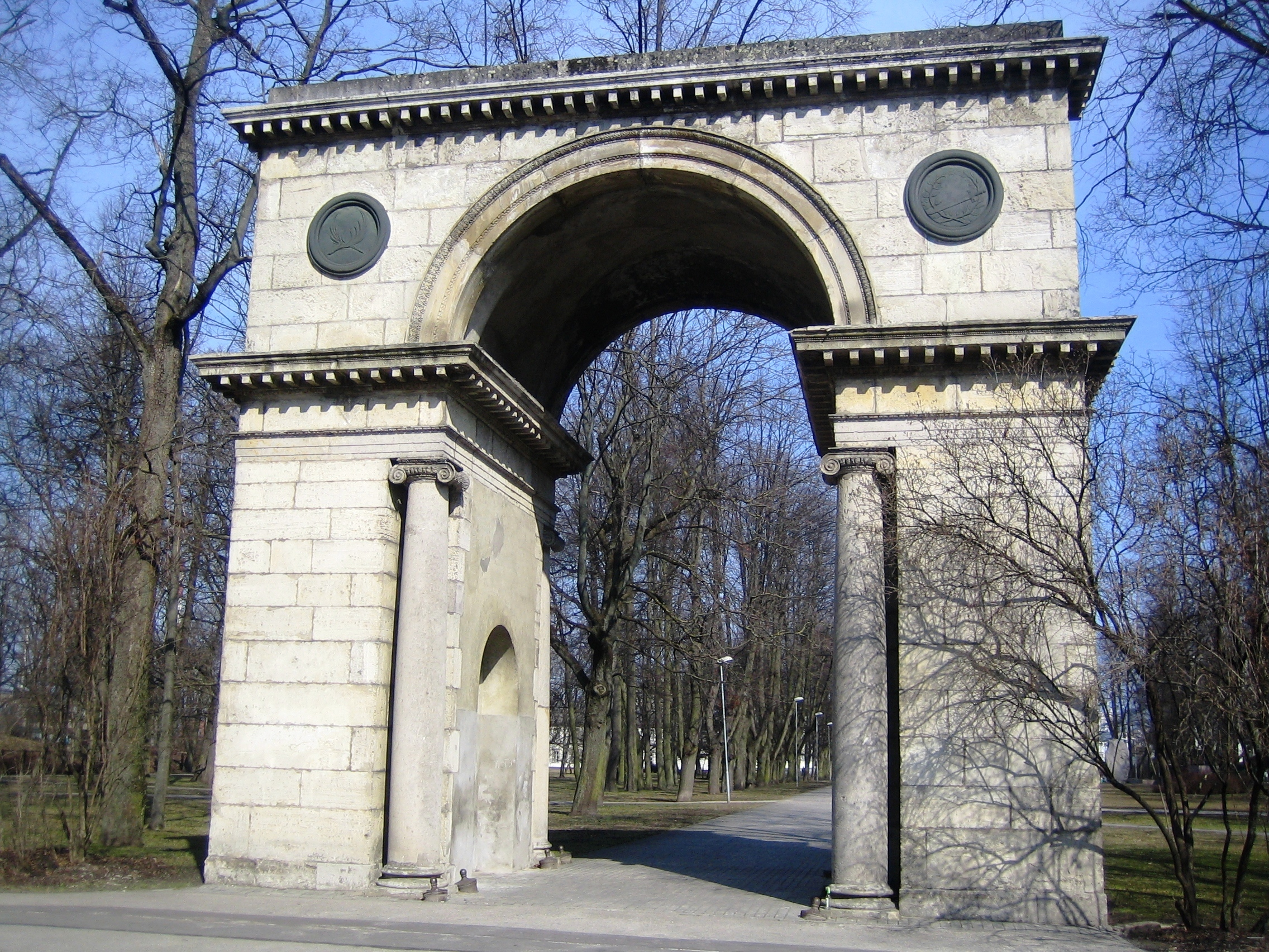 Aleksandra vārti Rīgā